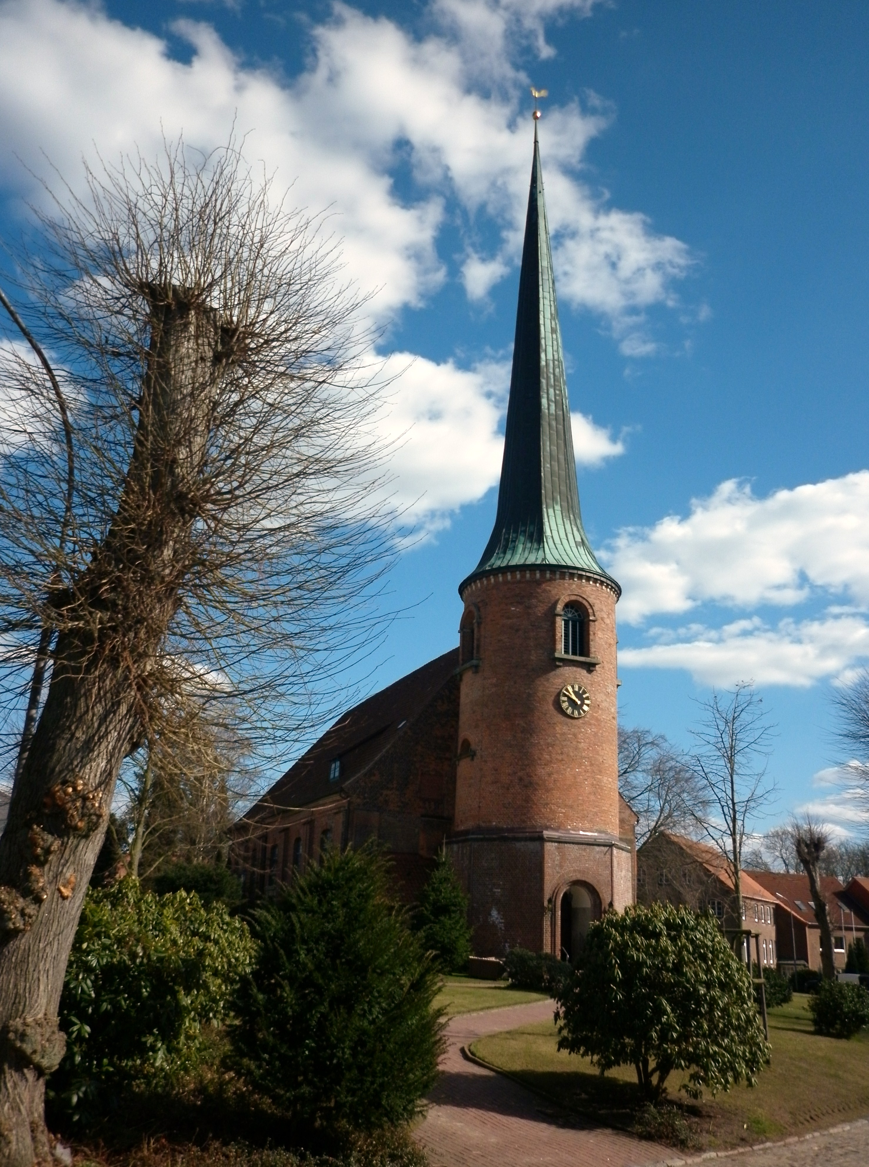 Barmstedter Kirche, 2011